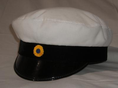 Studentmössa Tagit av Ronald Schwarz 2005-01-26